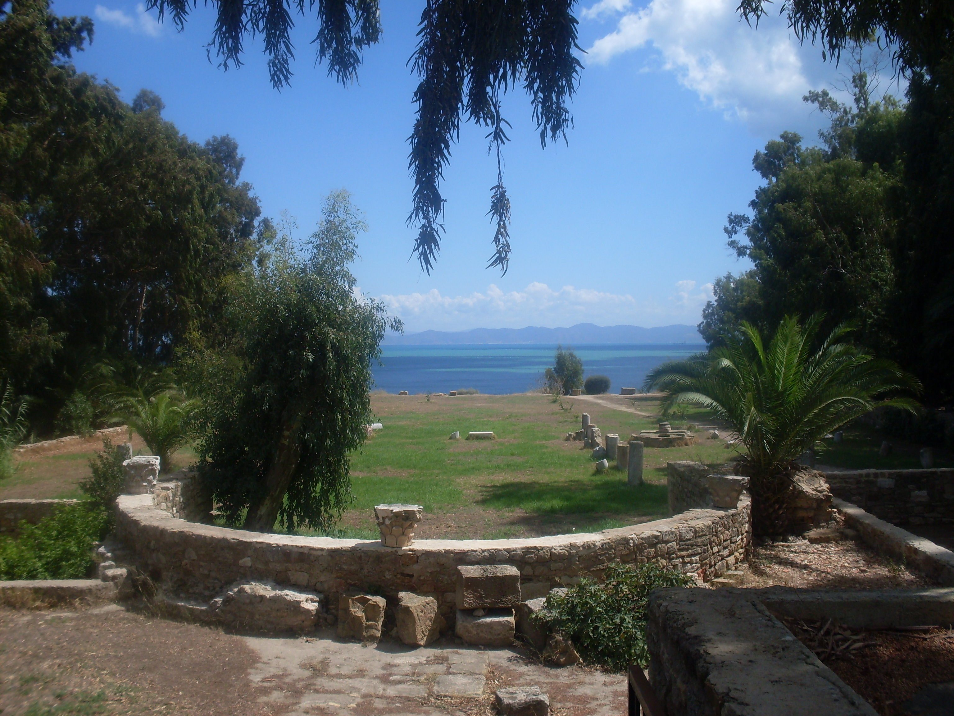 Basilique Saint-Cyprien à Carthage, Tunisie